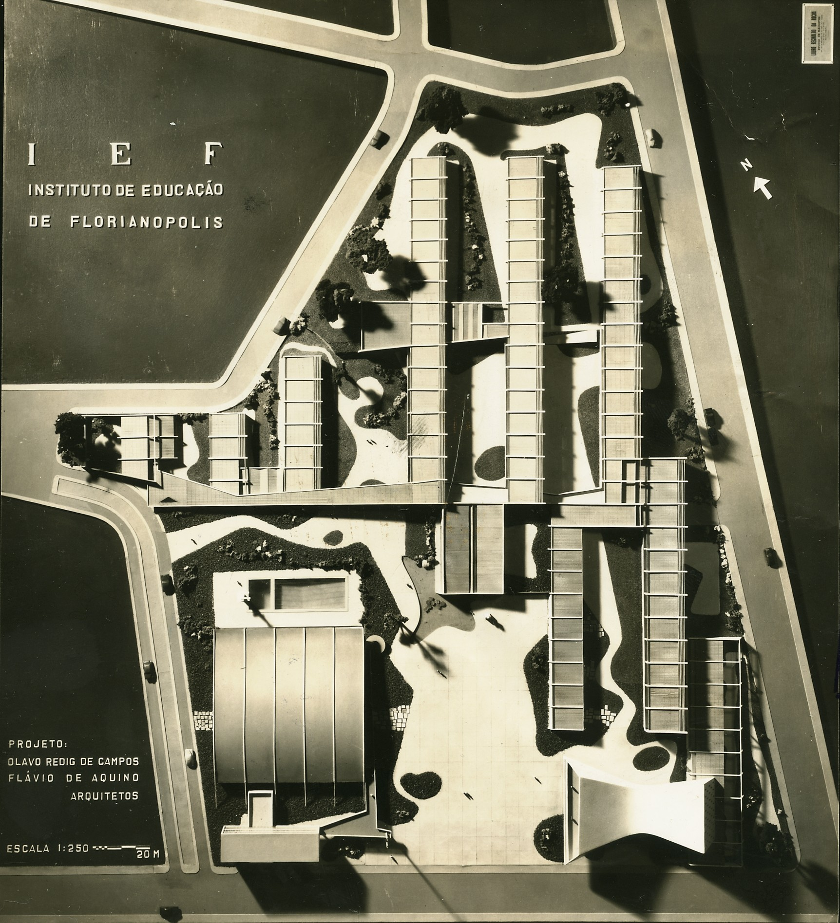 Fotografia do Fundo Correio da Manhã, sob a guarda do Arquivo Nacional.